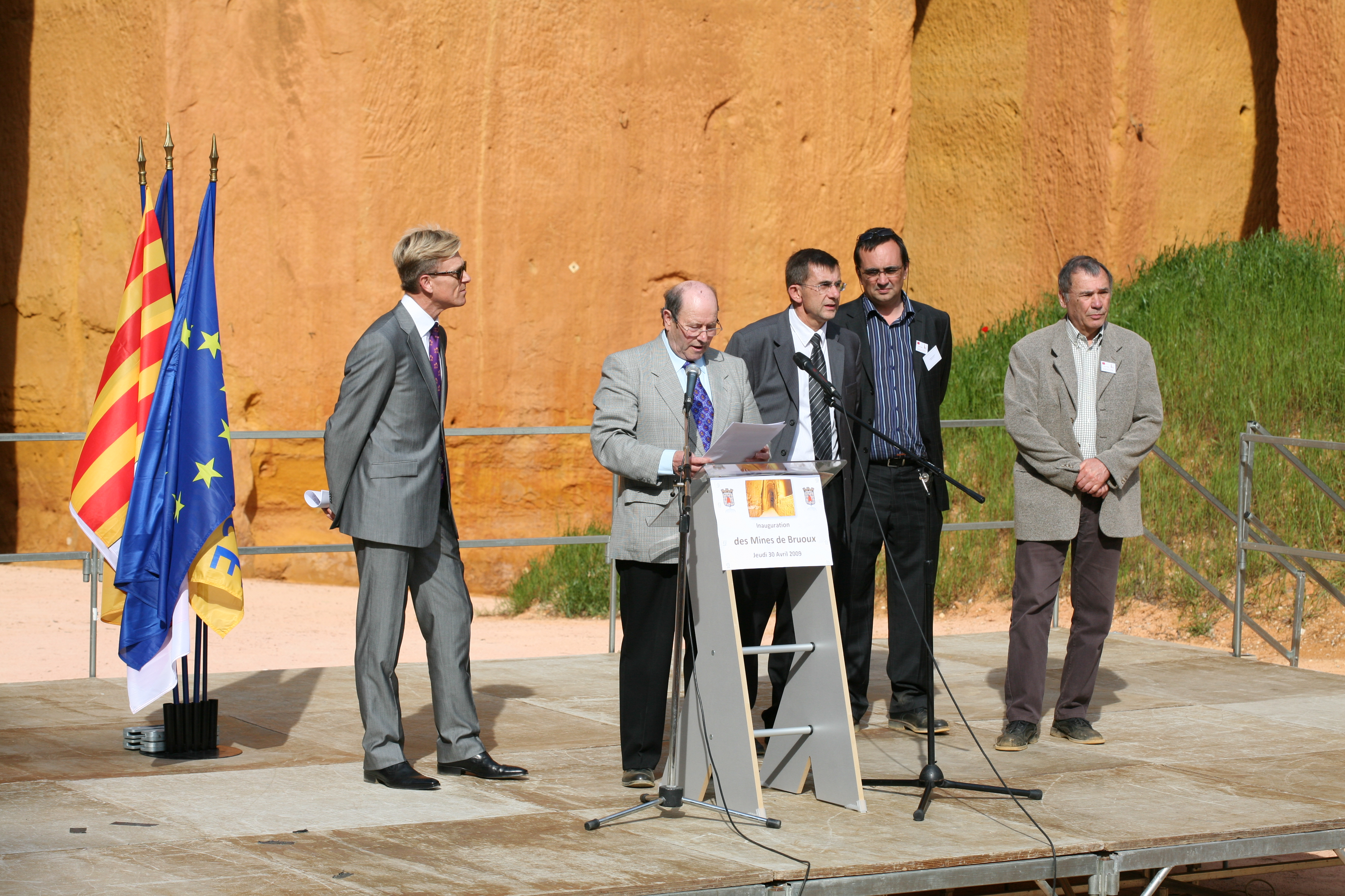 Le maire de Gargas, le sous-préfet et personnalités politiques du Luberon lors de l'inauguration des mines de Bruoux à Gargas, Vaucluse, France